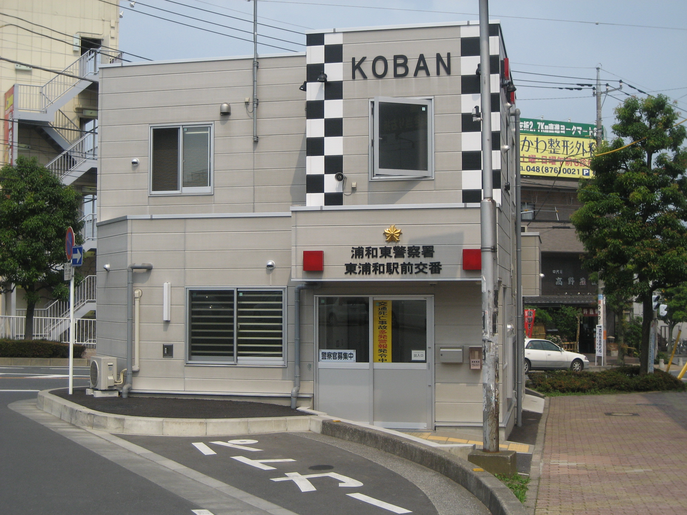 埼玉県浦和東警察署東浦和駅前交番